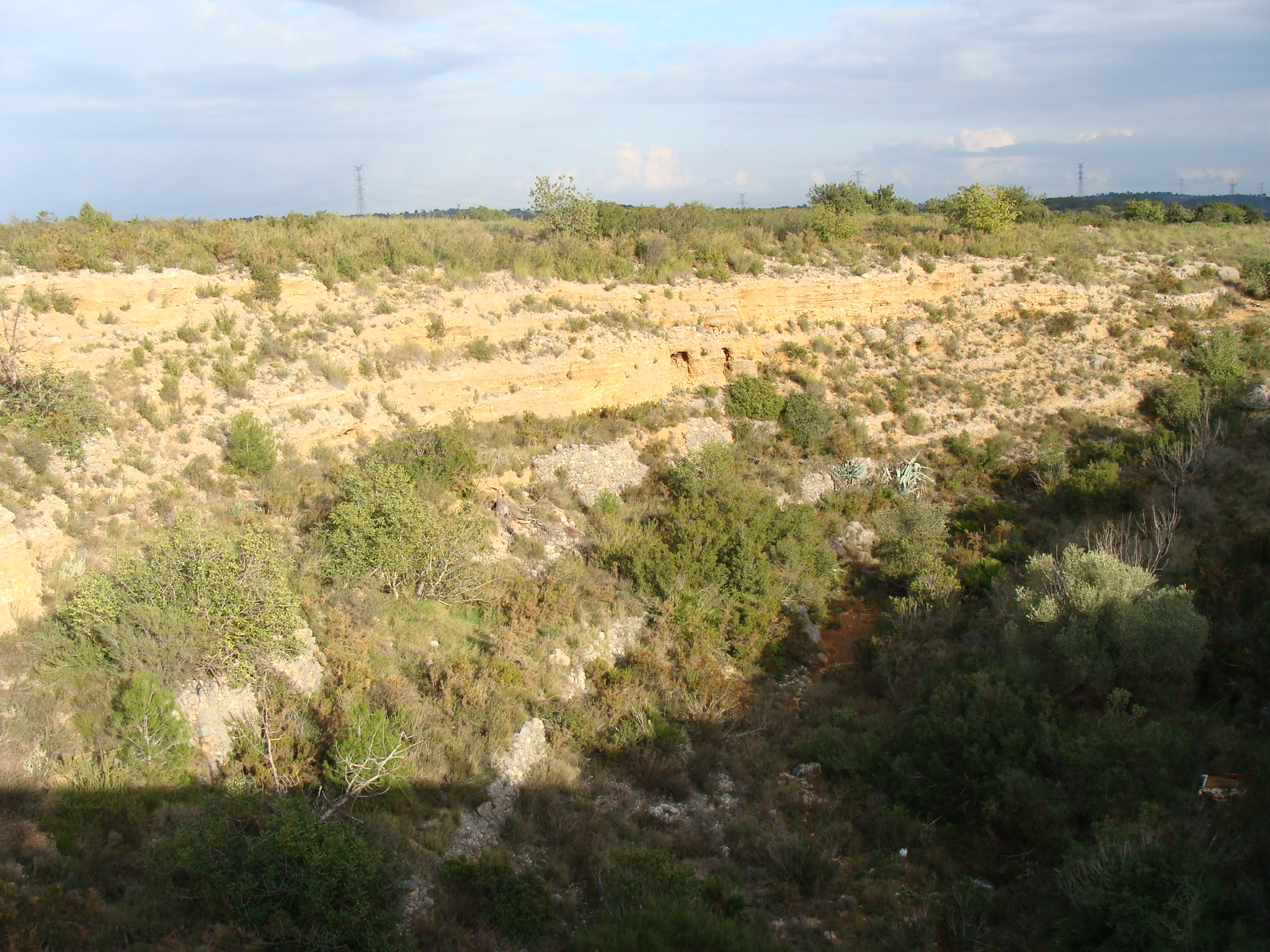 Imagen de la Rambla de La Colaita hacia el Este, mostrando los estratos de margas en un meandro, y también obras de protección contra la erosión, en el propio cauce